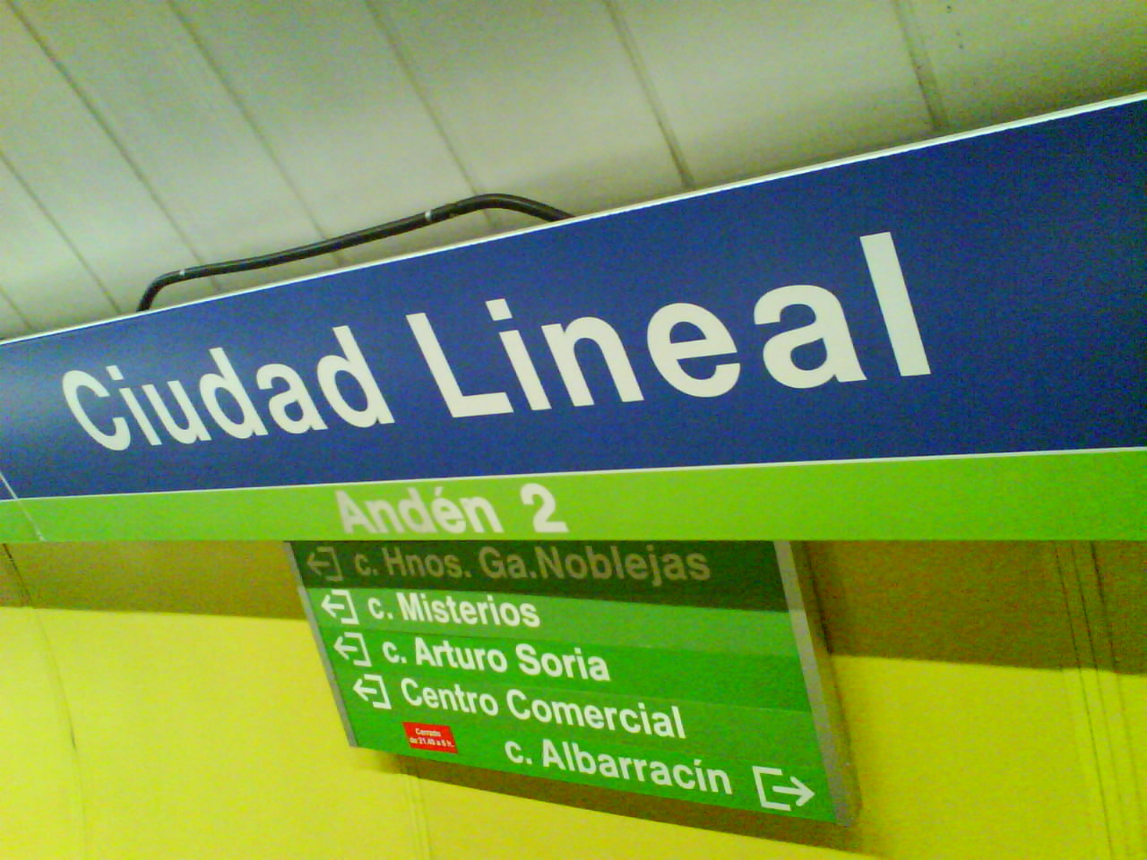 Rótulo de estación de ciudad lineal